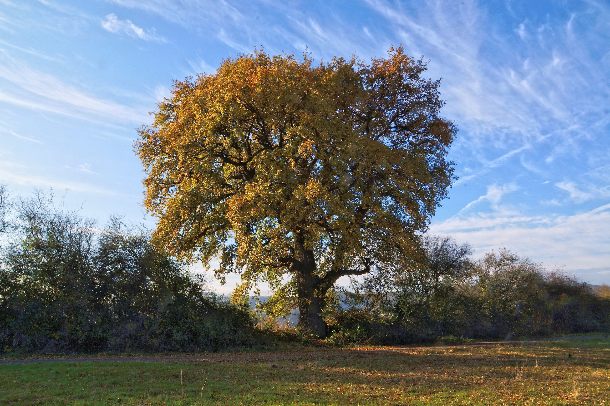 Dicke Eiche (Kelteneiche) bei Ulmet